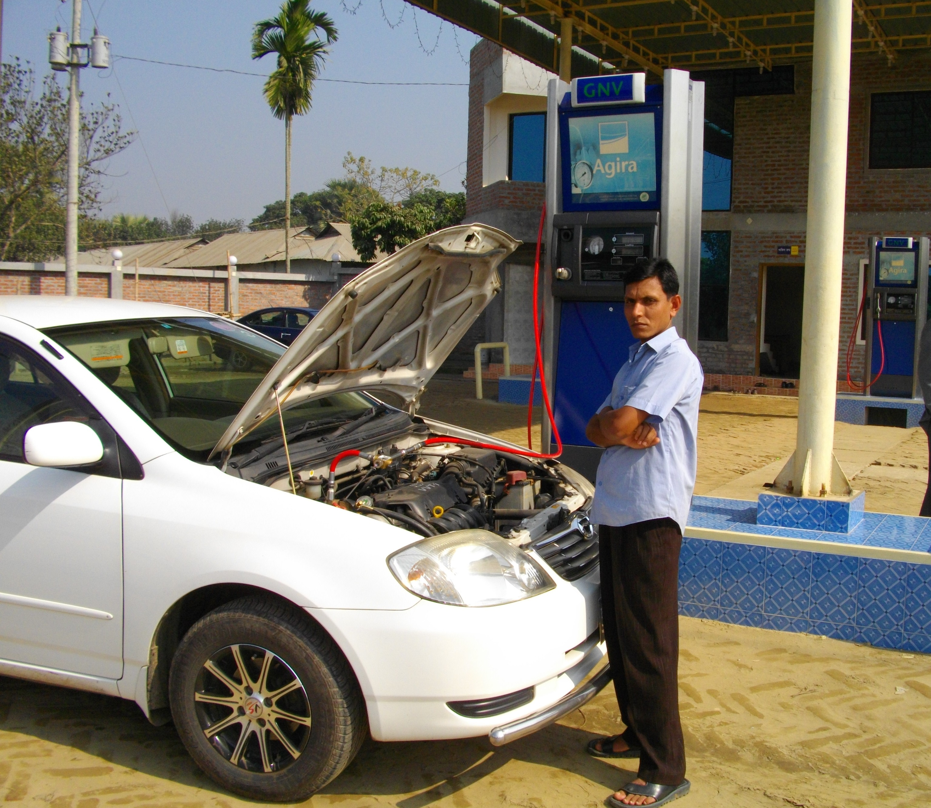 Refueling a car in a CNG station near Dhaka, 2009